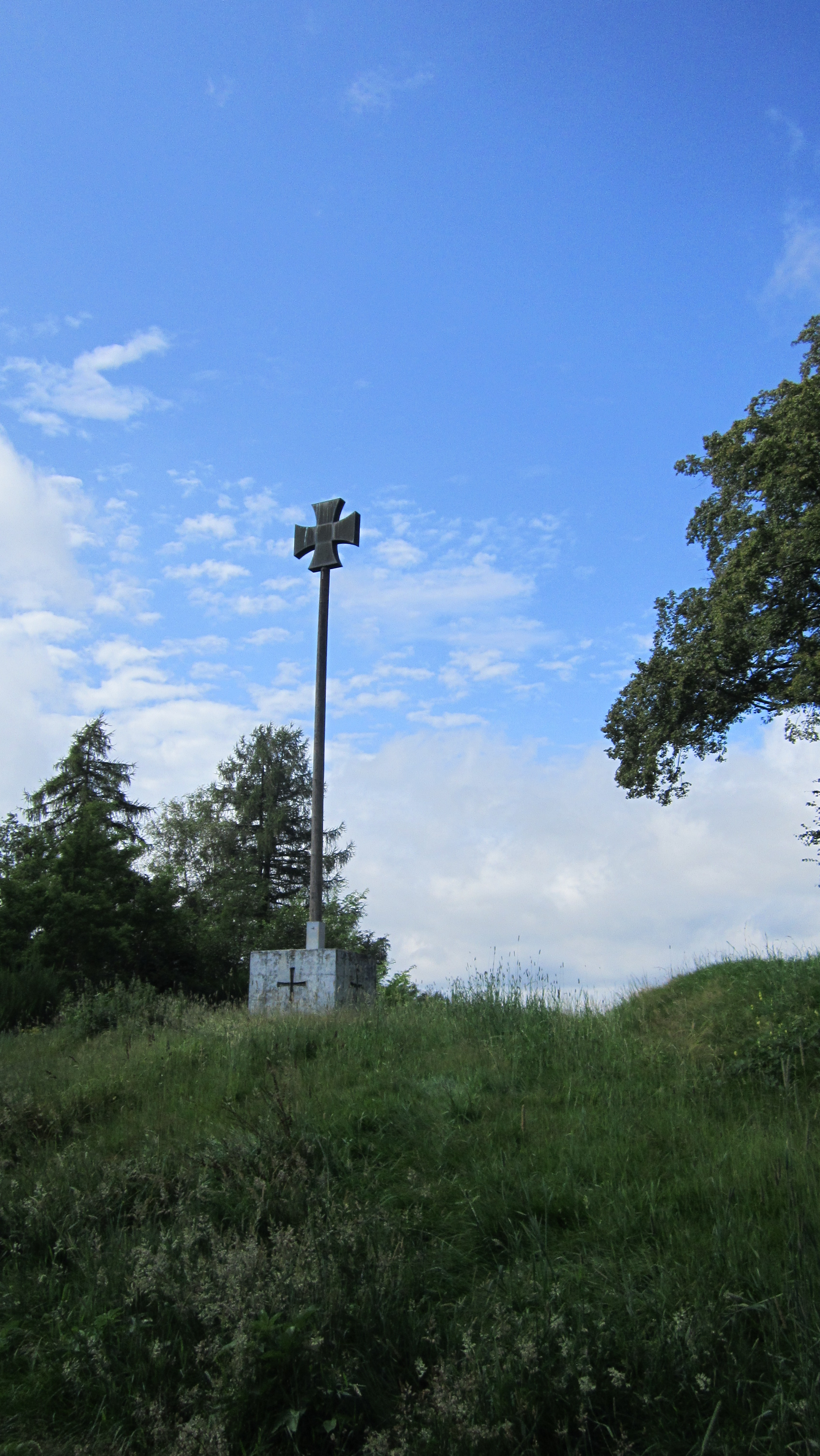 Säule mit Eisernem Kreuz